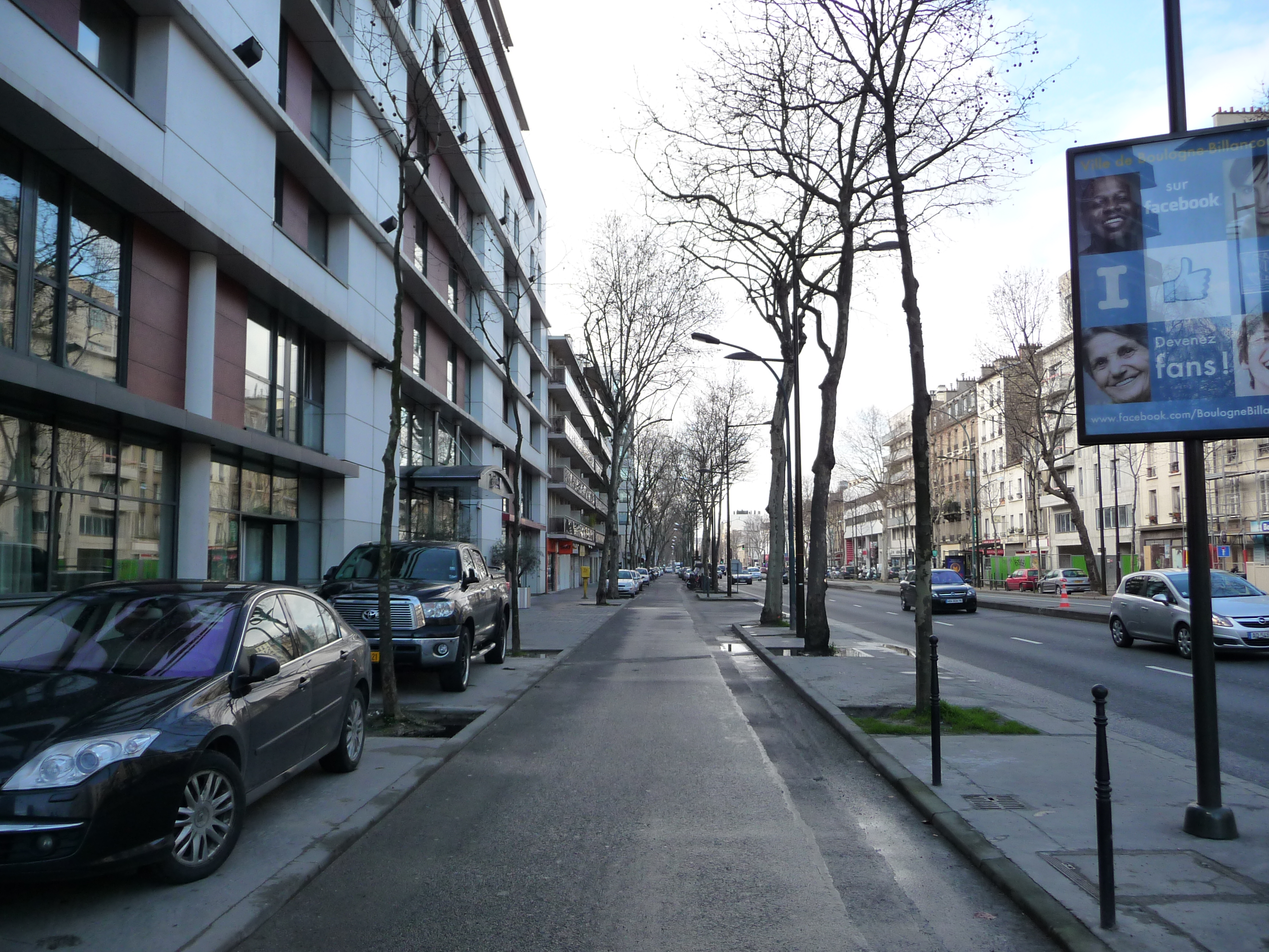 Avenue Edouard Vaillant